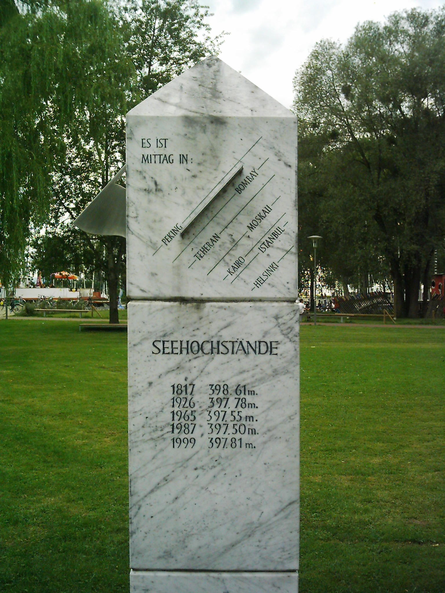 Grenzstein, Landmarke im Strandbad Lochau-Hörbranz am Bodensee